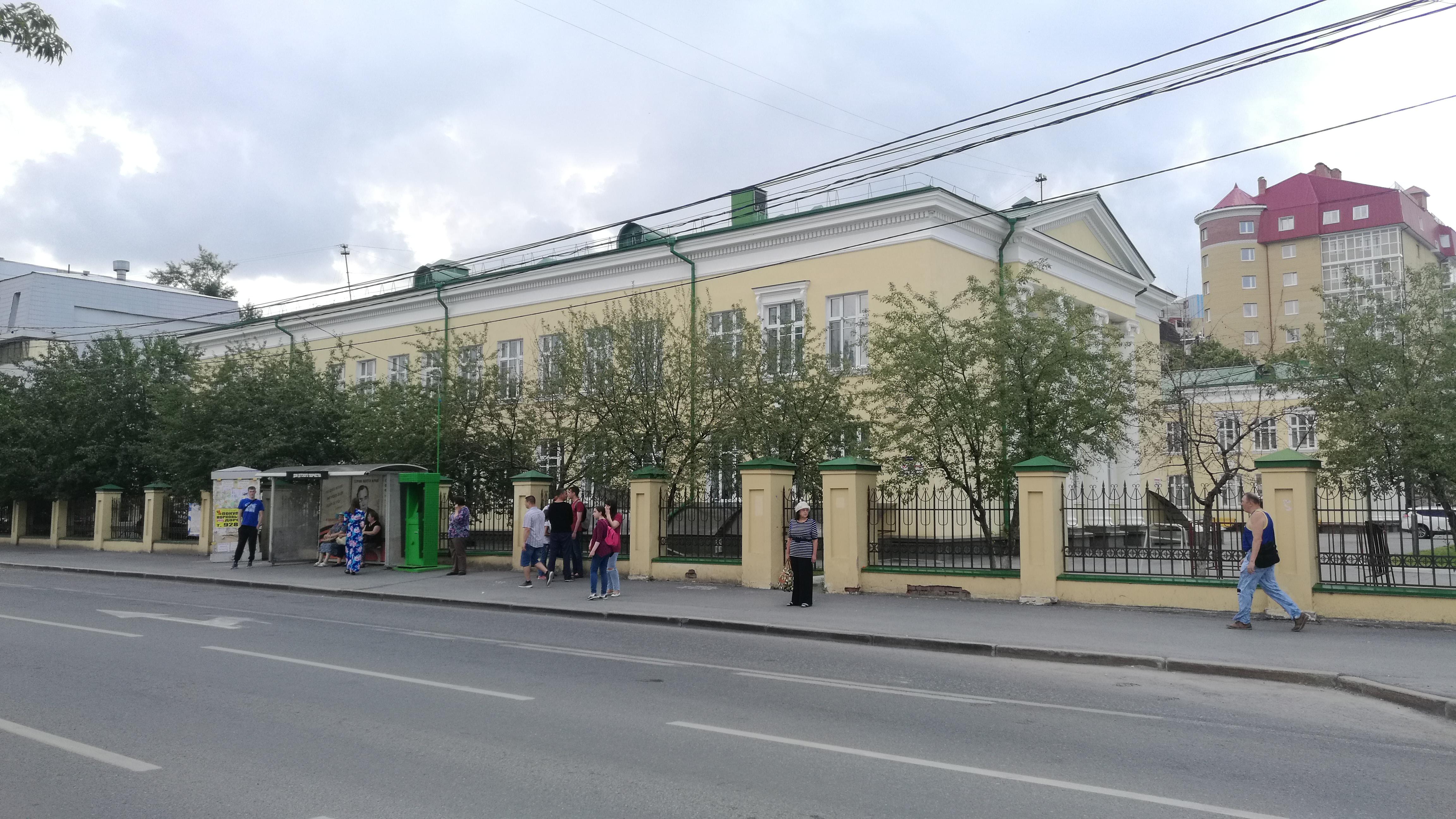 Pioner. Tjumeno, Rusio.